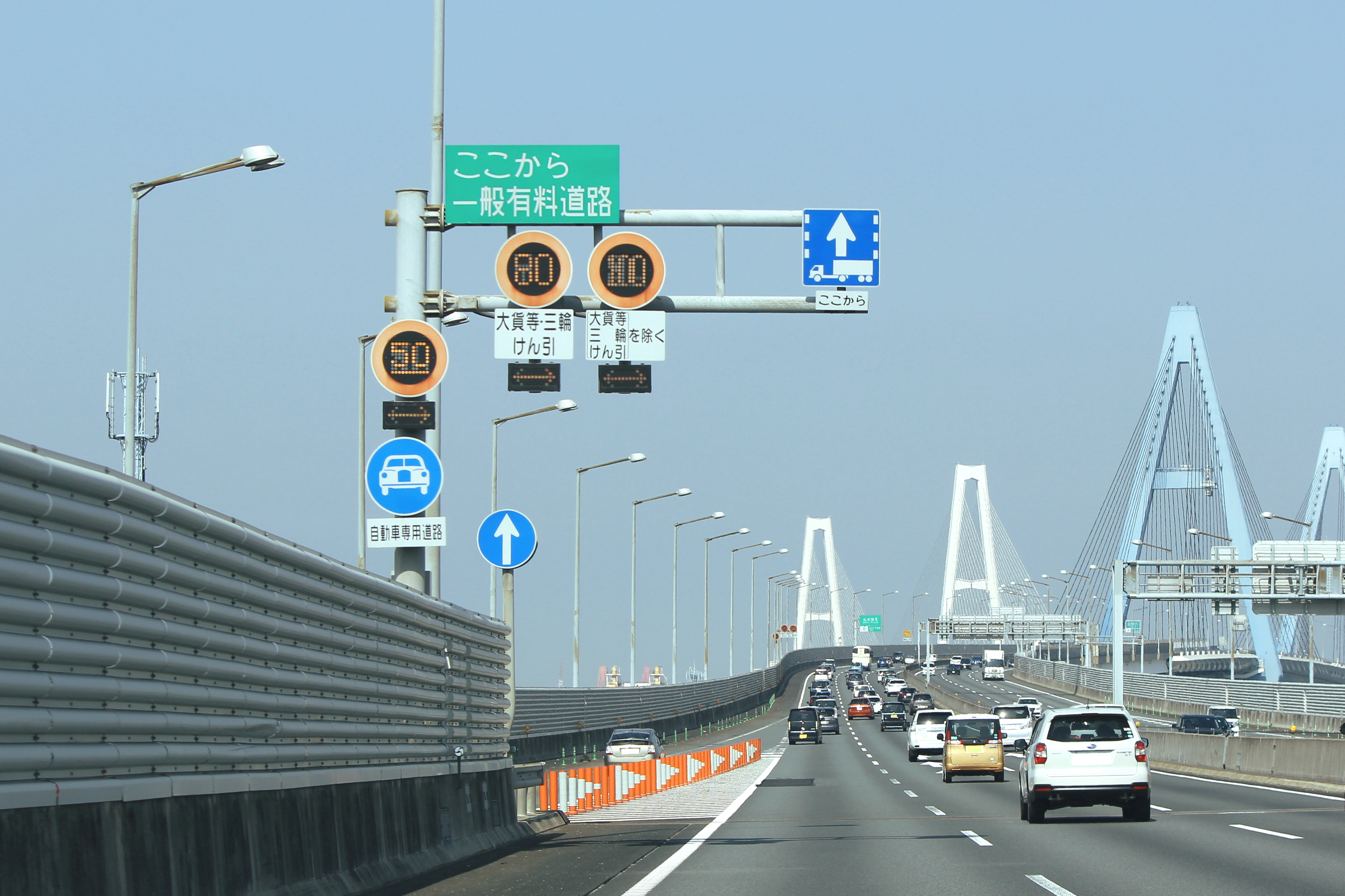 第二東名と伊勢湾岸道路の境に設置された標識群